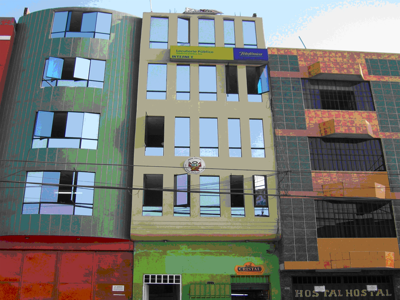 trasitorio sede